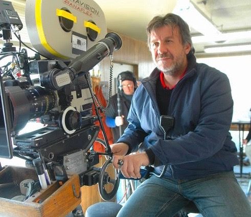 AGRESTI FILMANDO